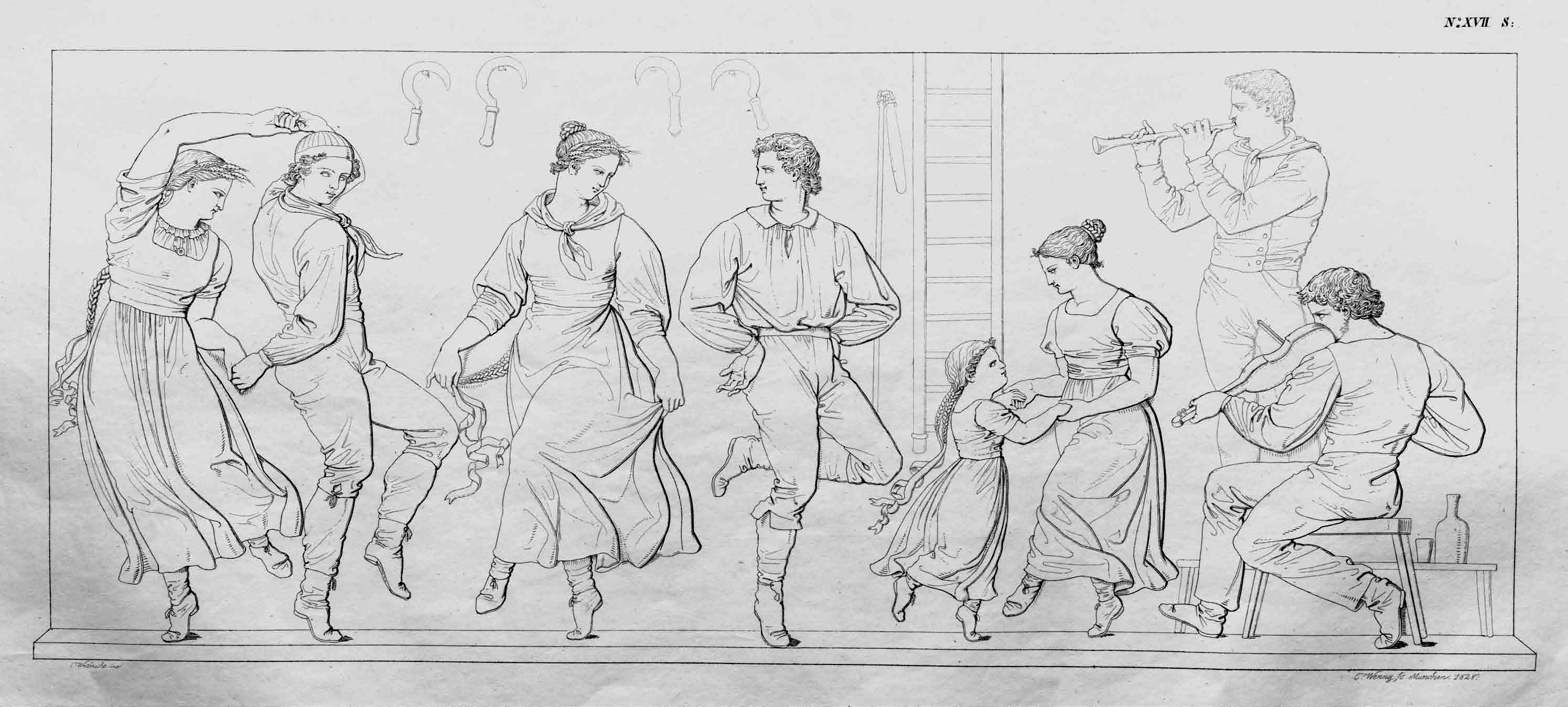 Blatt aus der Buchausgabe in Breitfolio von Conrad Weitbrechts graphischem Zyklus „Die vier Jahreszeiten“, das im Vierjahreszeitenfries von Schloss Rosenstein in Stuttgart realisiert wurde (teilweise mit Varianten).